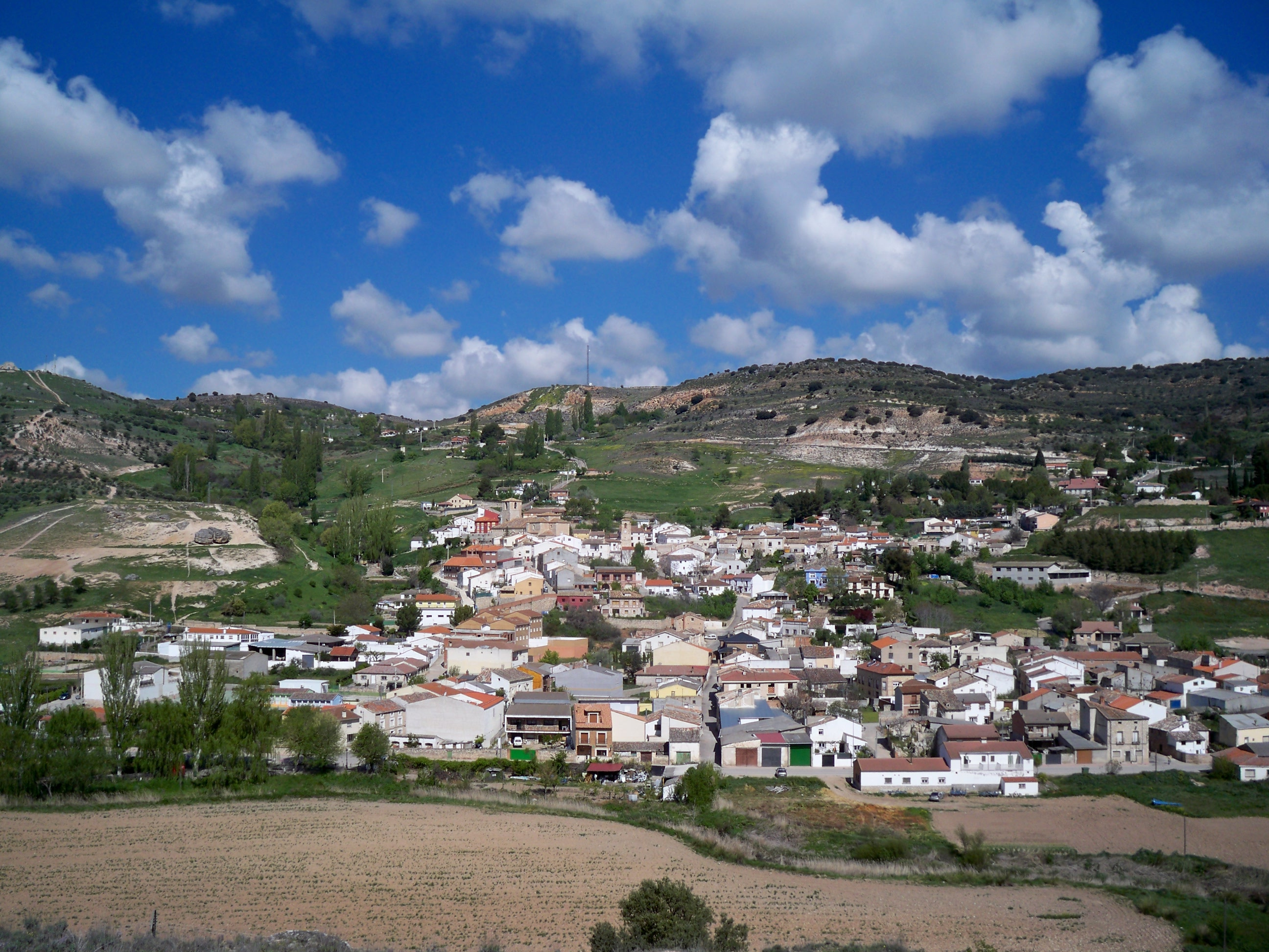 Vista general del casco urbano de Loranca desde el camino de la Fuente Pera